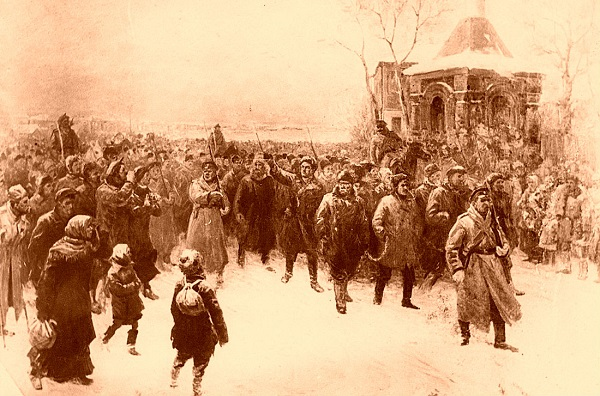 Арестованные руководители Старобуянской республики